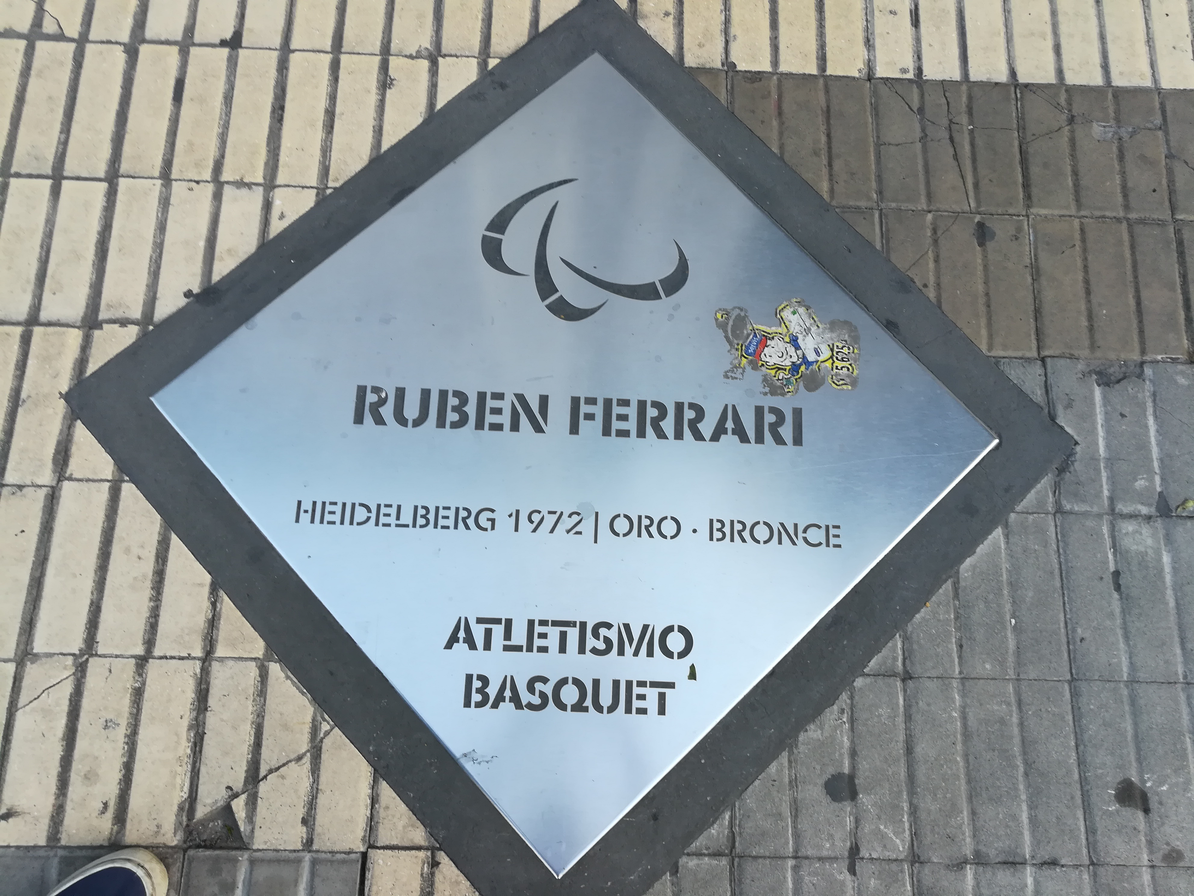 Paseo de los Olímpicos de los en la Avenida Pellegrini (Rosario).